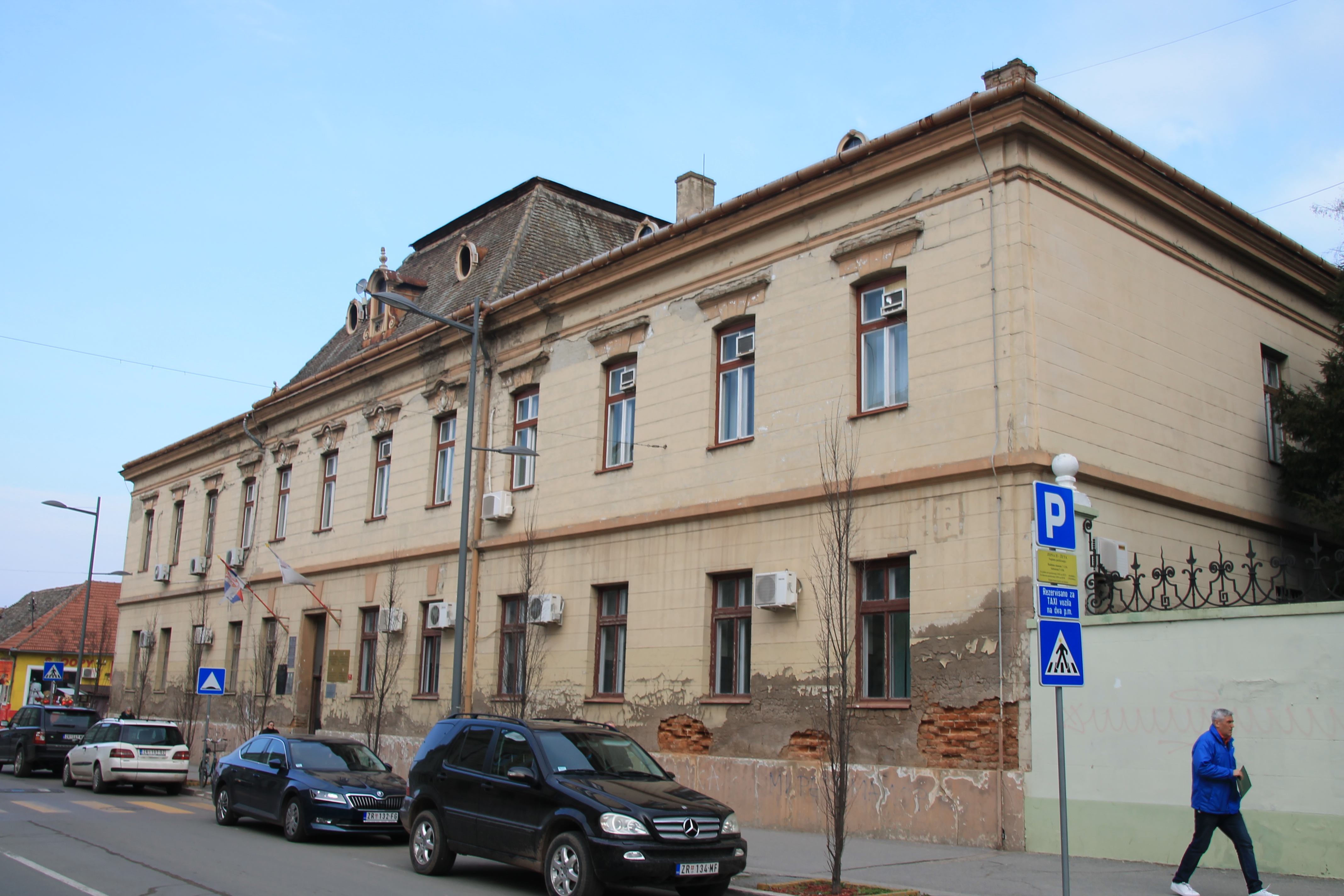 Staro jezgro Zrenjanina